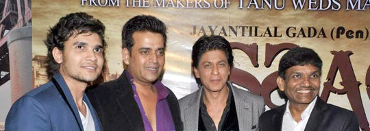 Dhaval Gada, Ravi Kishan, Shahrukh Khan and Jayantilal Gada at premiere of Issaq